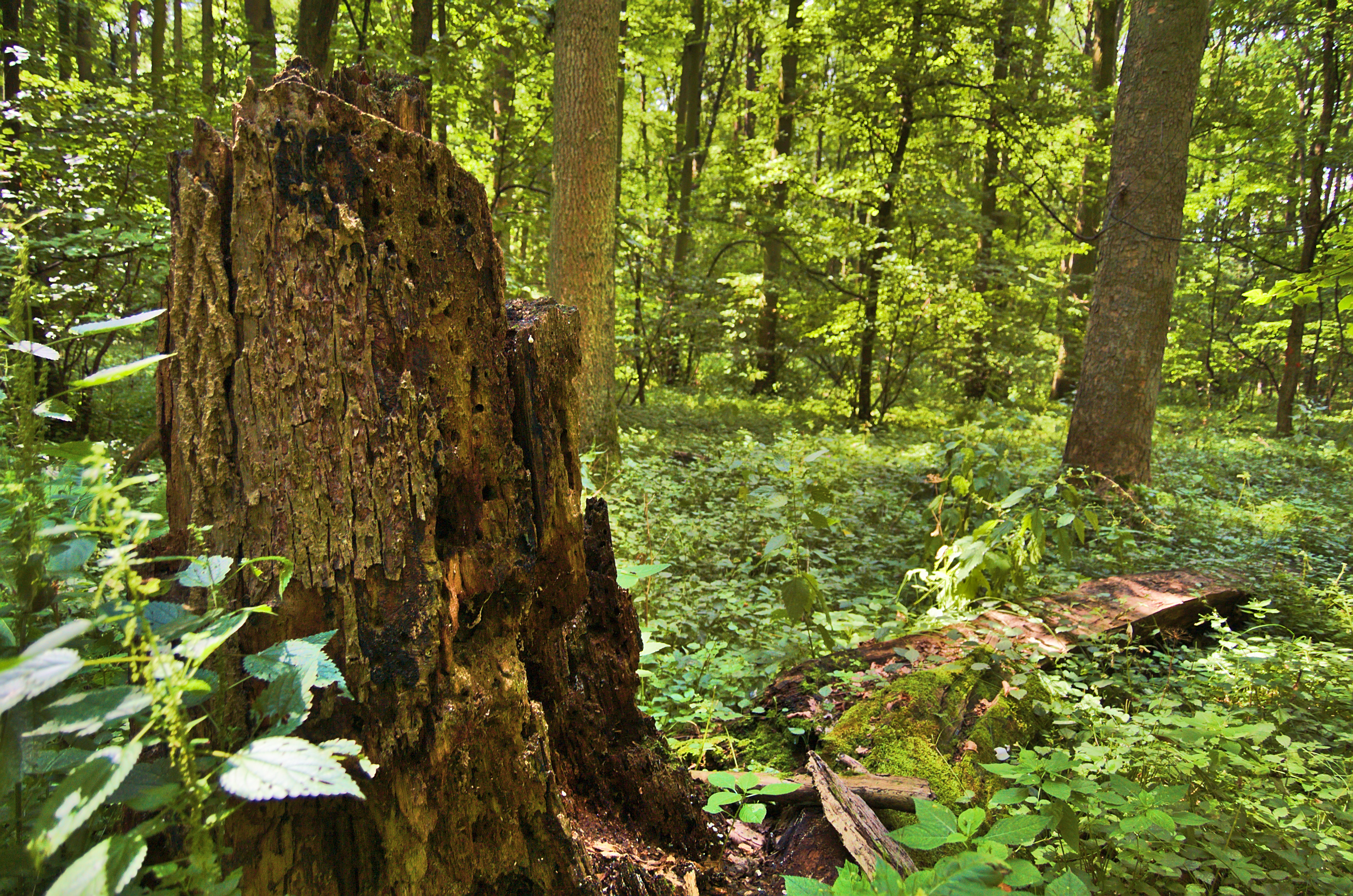 Národní přírodní rezervace Vrapač, okres Olomouc